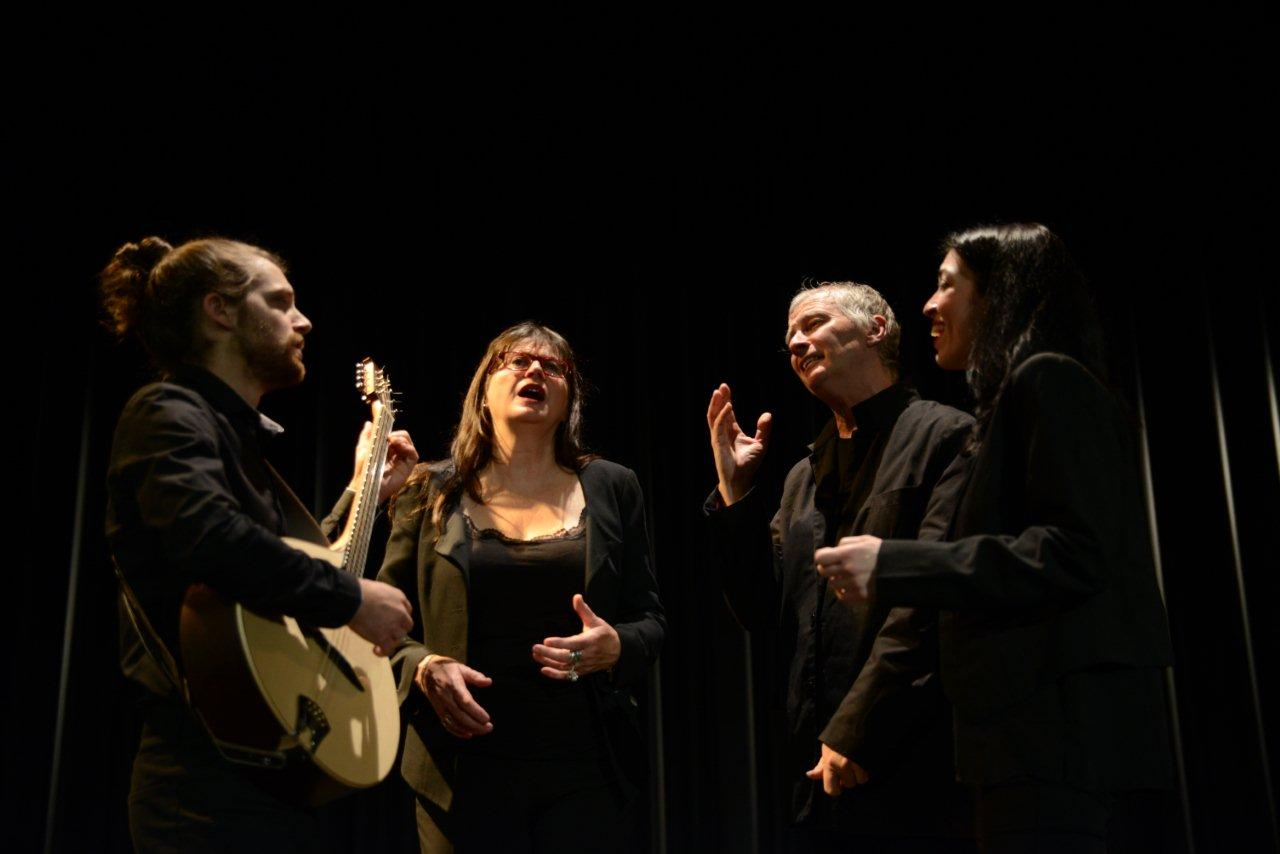 Corou de Berra 2015